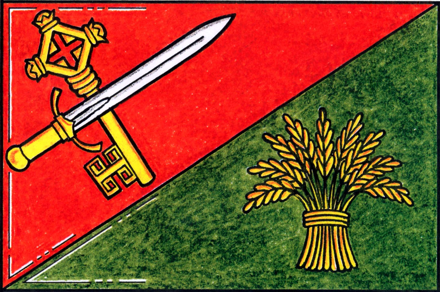 Česky: vlajka obce Hosín